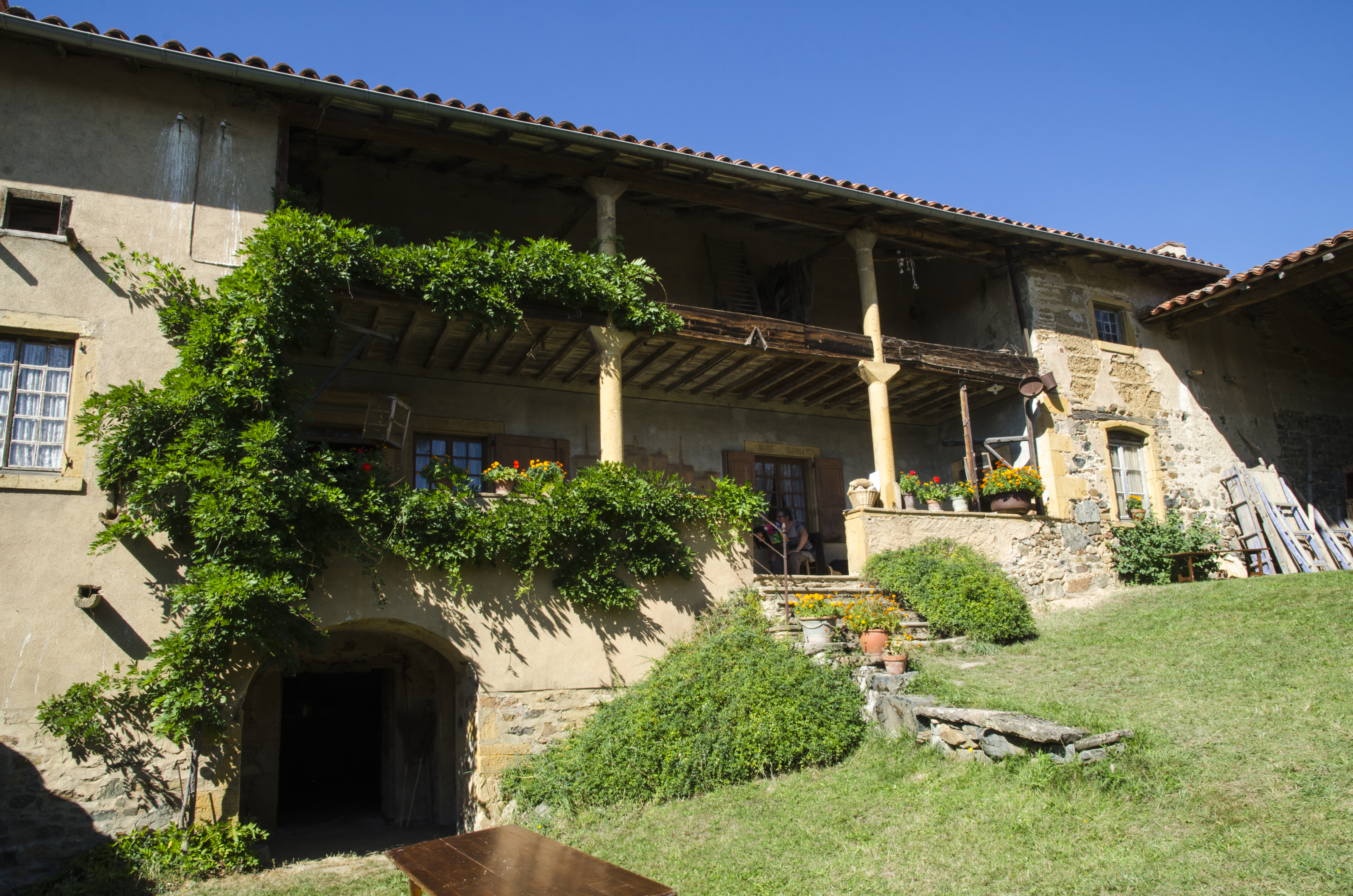 Cour intérieure de la ferme Reverdy, à Saint-Julien-sur-Bibost, Rhône, France .